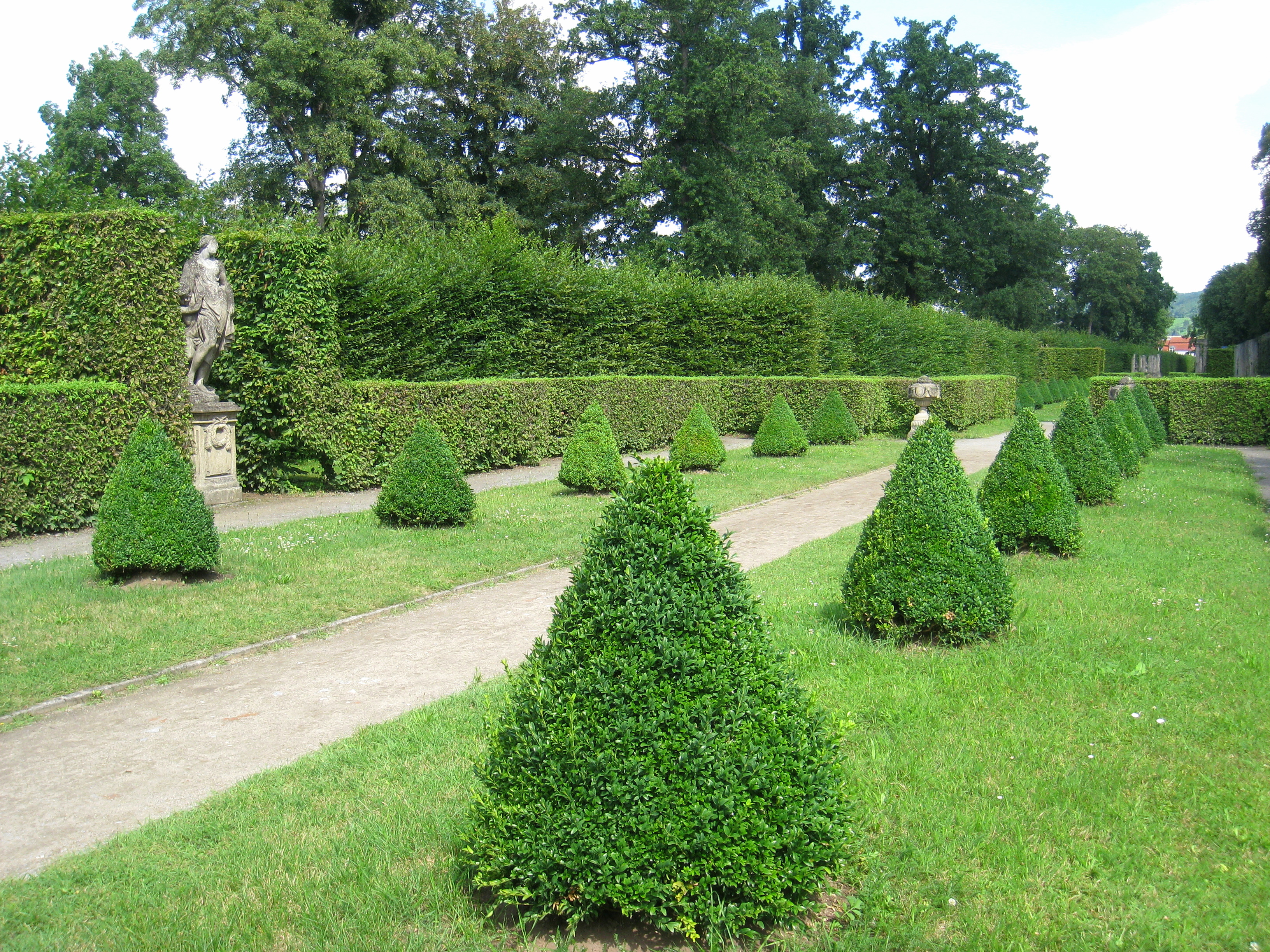 Rococo garden, Schloss Veitshöchheim, Franconia, Germany.